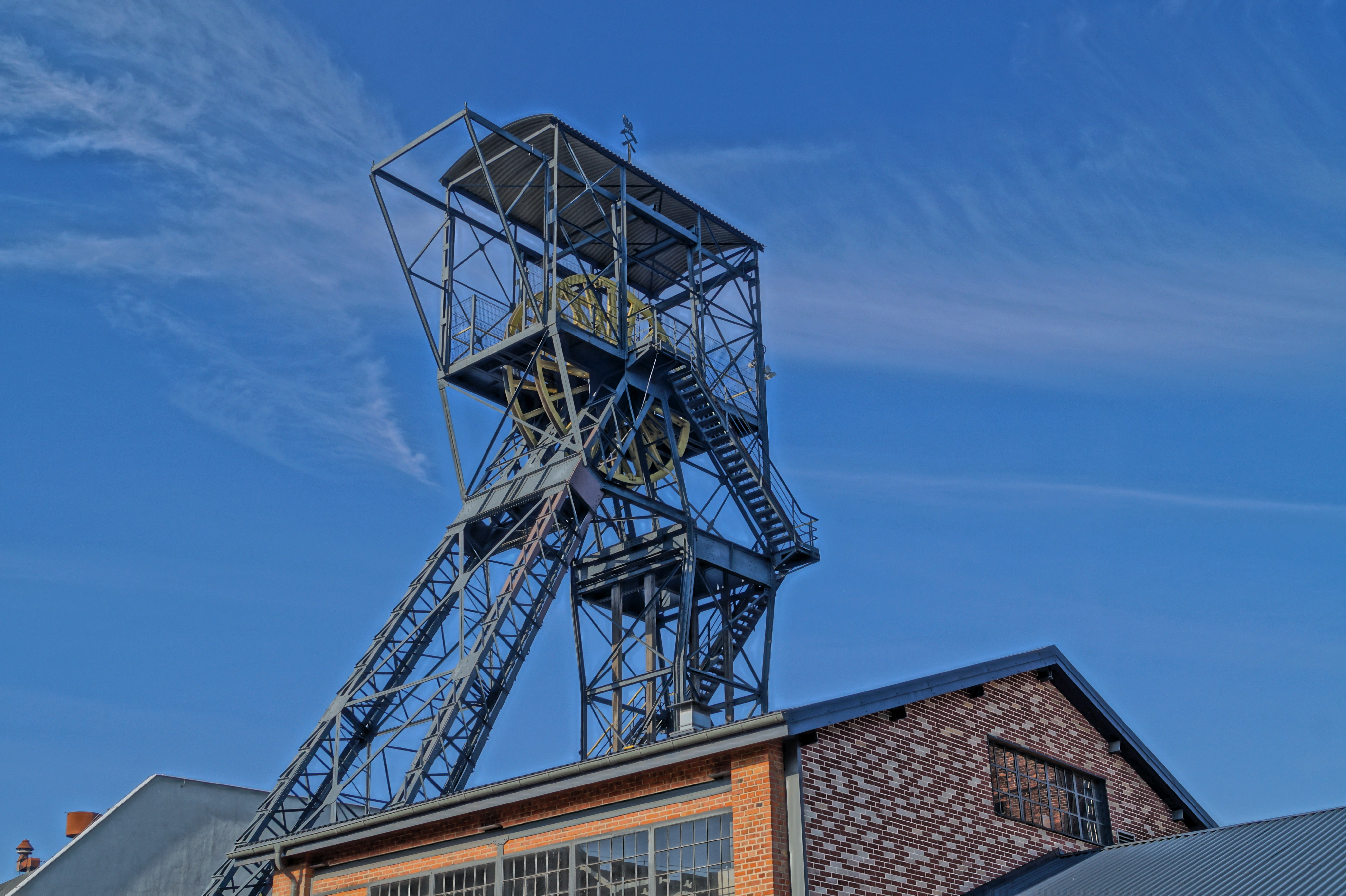 This photo was taken during Automotive Wikiexpedition 2016 set up by Wikimedia Polska Association. You can see all photographs in category Wikiekspedycja motoryzacyjna 2016. English | Polski | +/− Wyciąg szybowy szybu Carnall w Skansenie Górniczym Królowa Luiza w Zabrzu